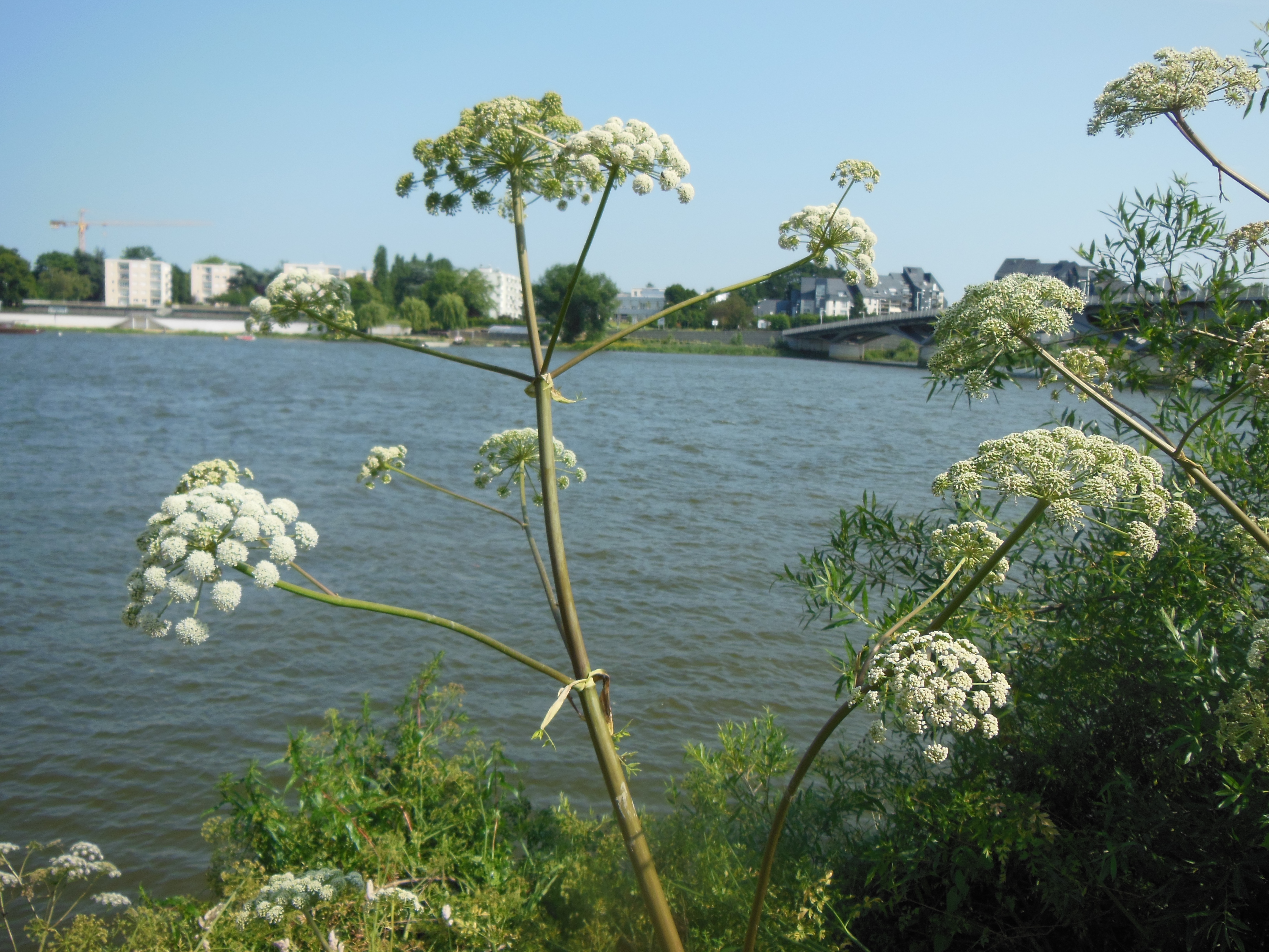 Angelica heterocarpa, ou Angélique des estuaires, en bordure de Loire à Nantes (France)